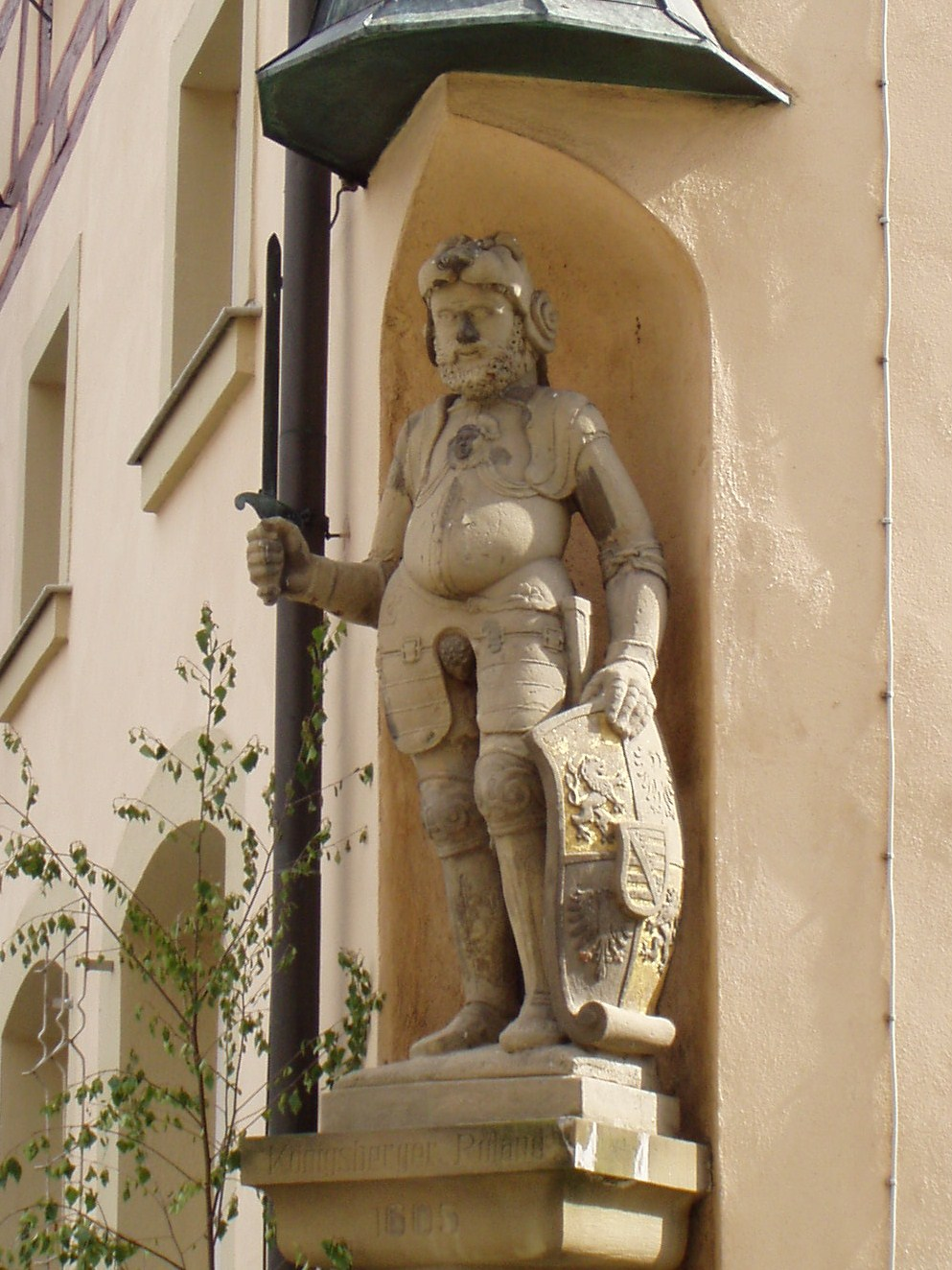 Roland statue in Koenigsberg (Bavaria), built in 1605